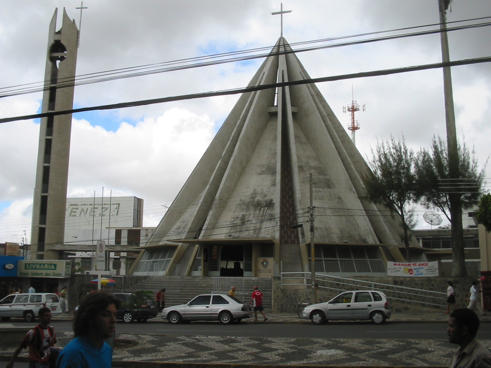 Catedral de Nossa Senhora das Dores - Caruaru, Pernambuco, Brasil.